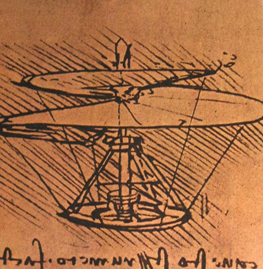 Leonardo da Vinci, design for a helicopter